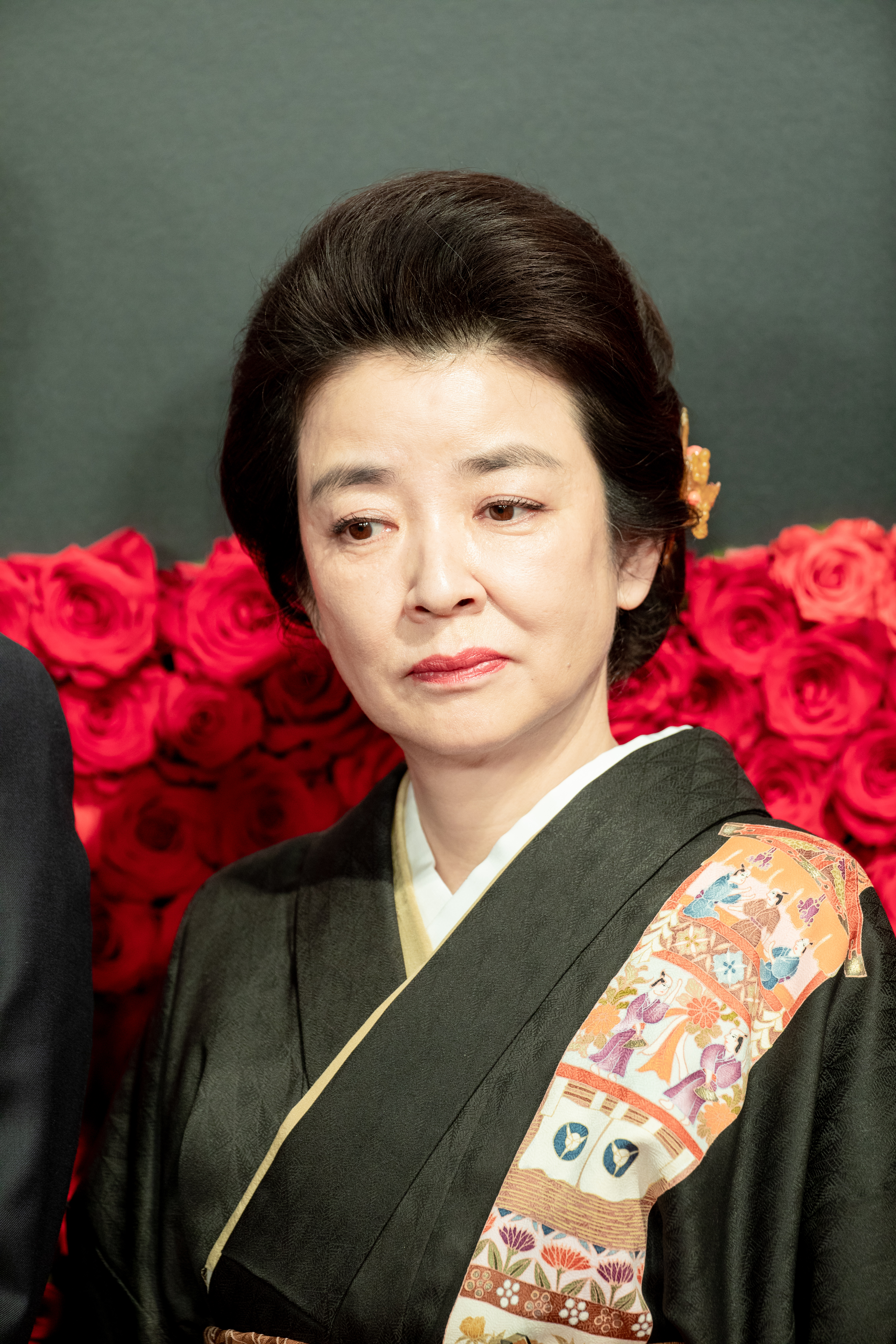 第30回 東京国際映画祭 オープニングセレモニー 岸本加世子 (鈴木家の嘘)